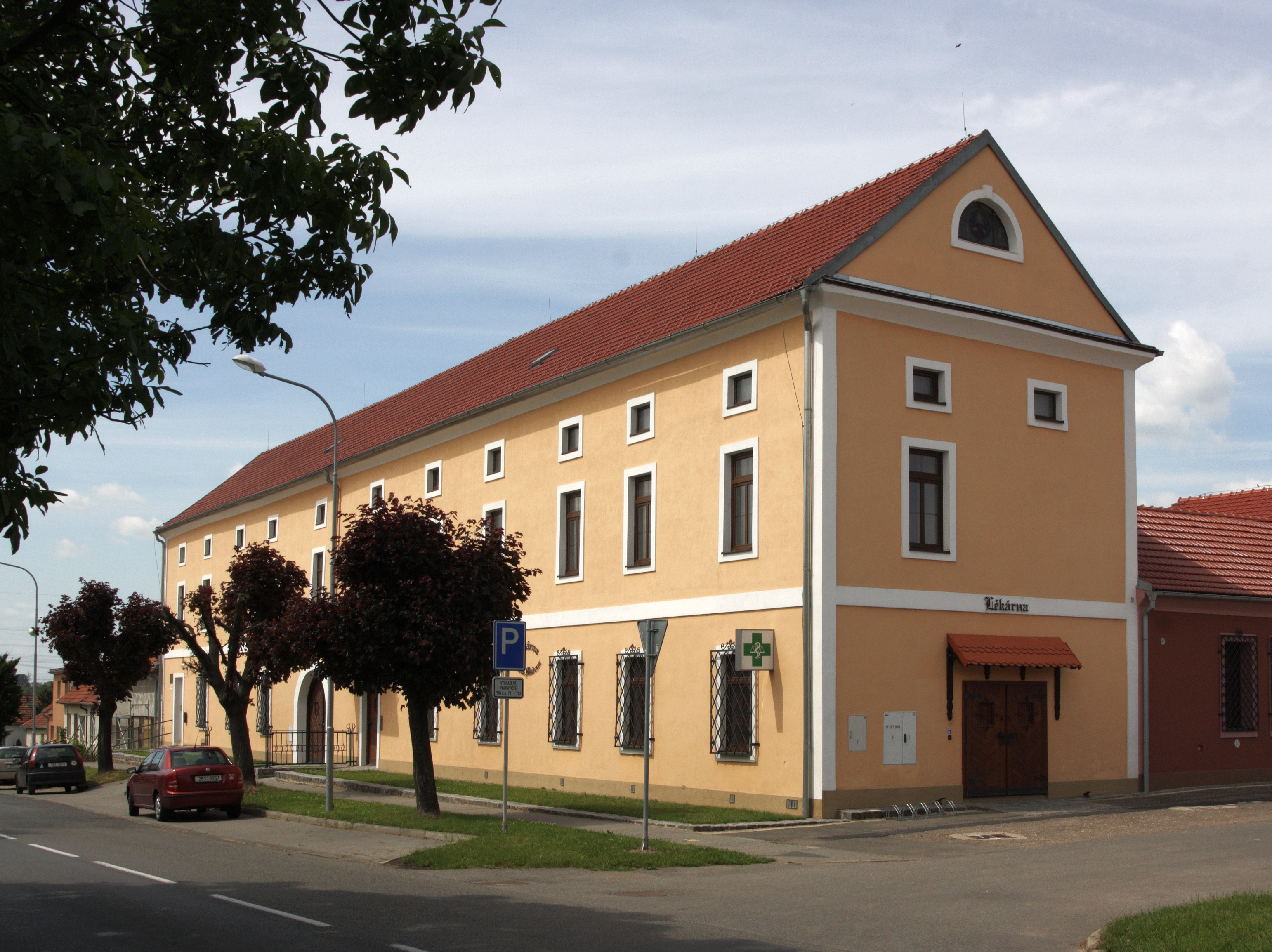 Újezd u Brna - tzv. židovna, bývalá barokní sýpka z roku 1750, později přestavovaná.